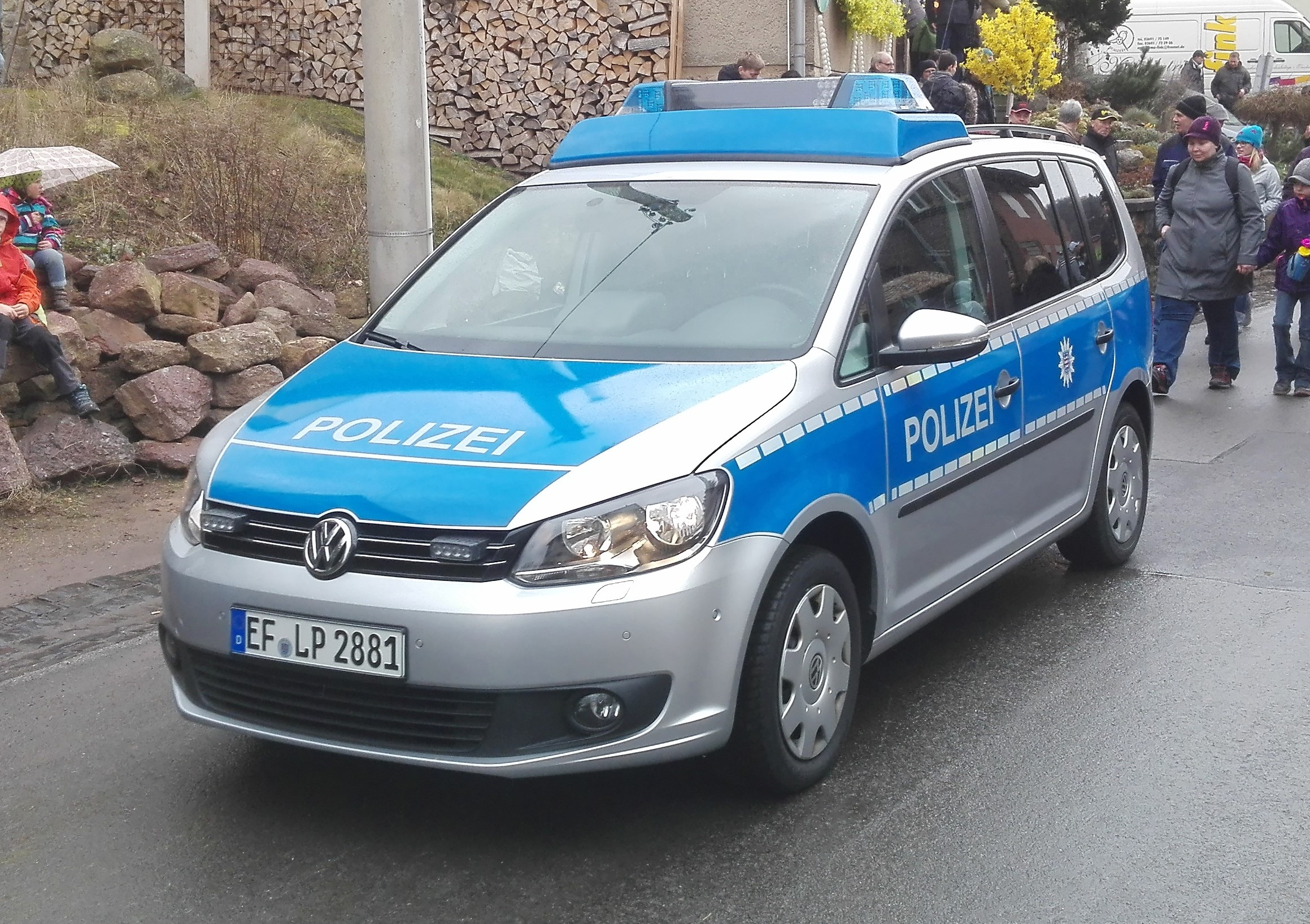 Ein Funkstreifenwagen der Thüringer Polizei beim sog. "Sommergewinn" in Eisenach 2016. Die Beamten sicherten mit dem Funkstreifenwagen den traditionellen Festumzug von Hinten ab.